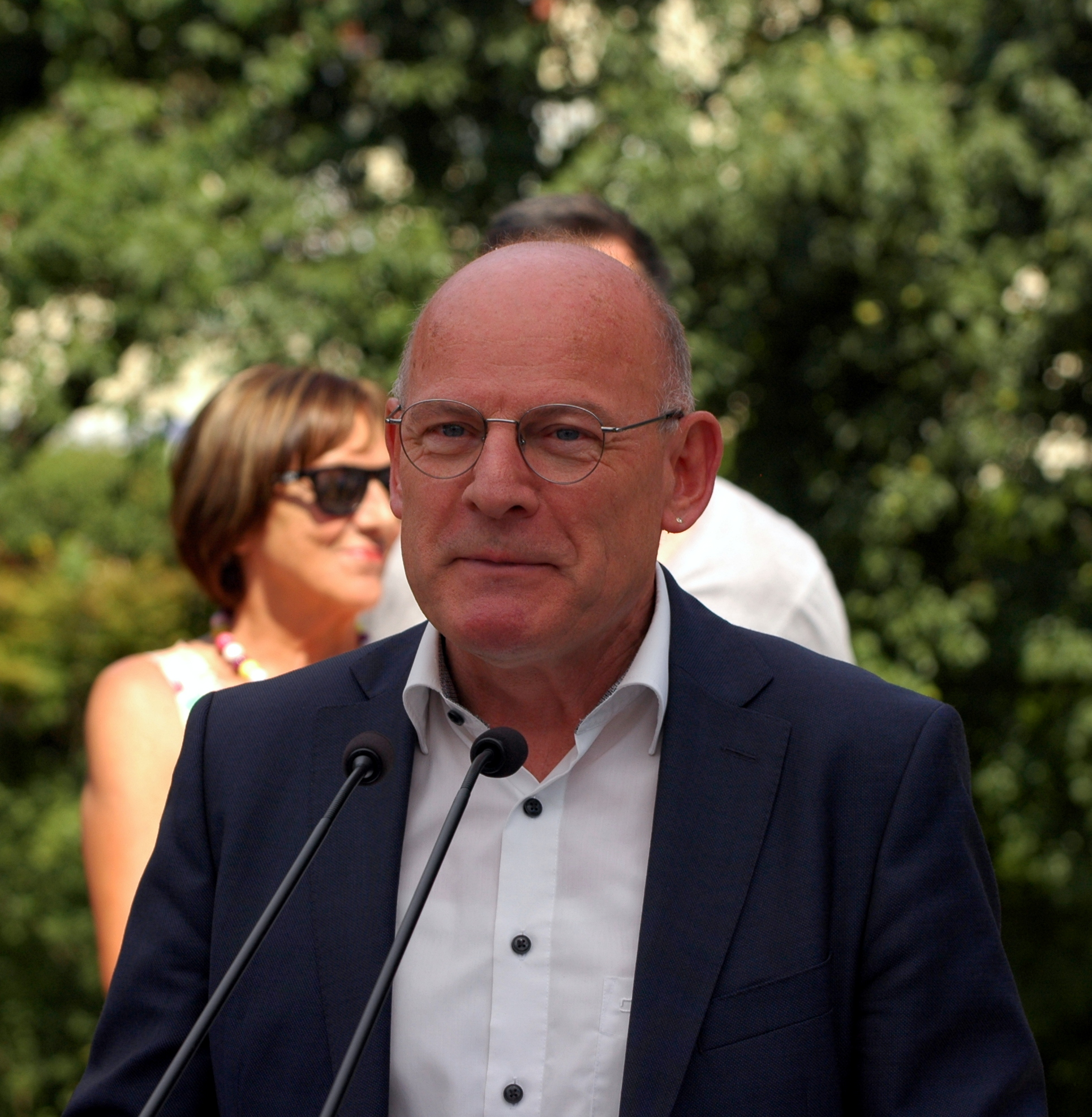 Verkehrsminister Winfried Hermann in Bammental